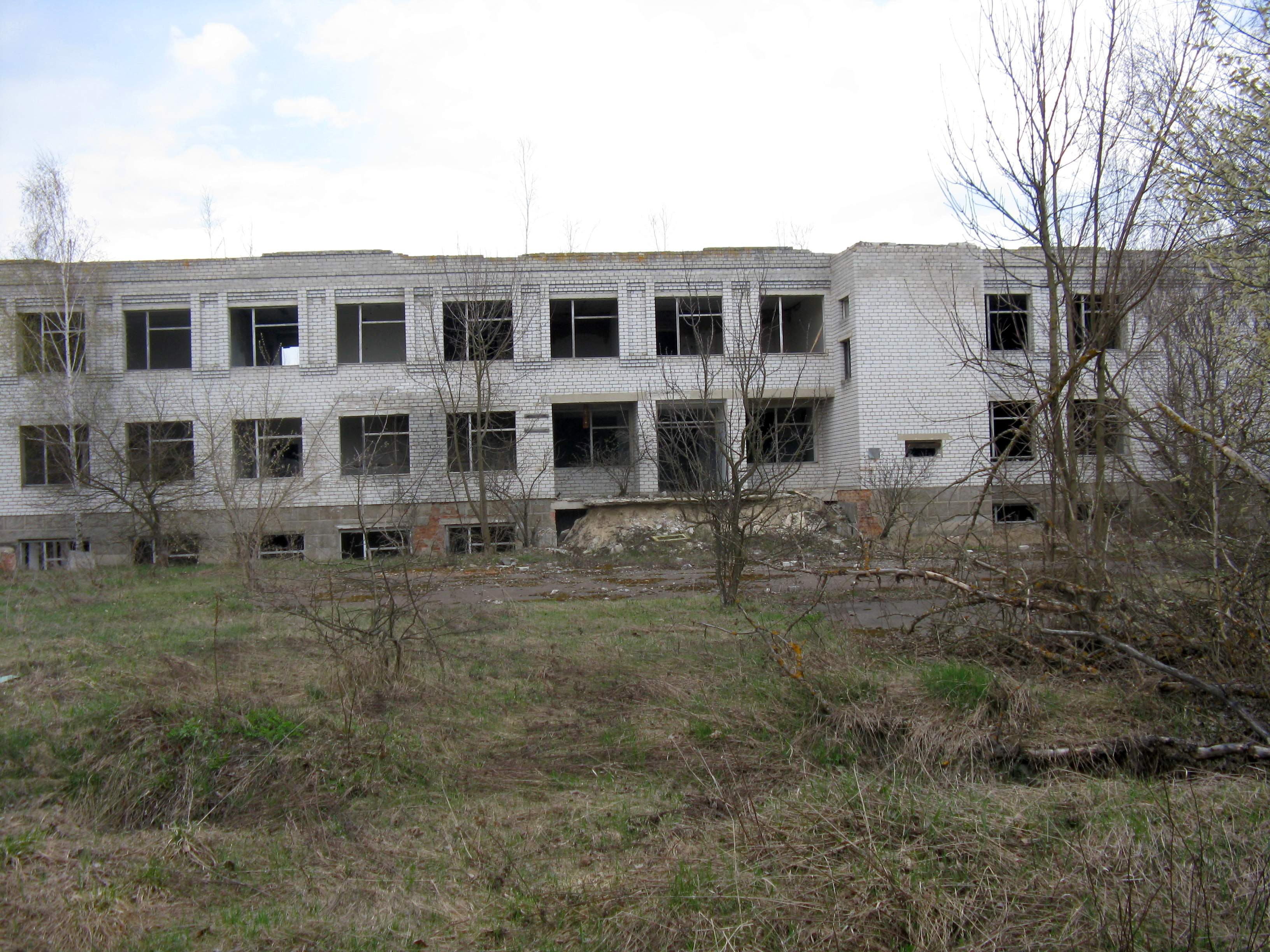 Приміщення нової школи у с. Тараси Поліського р-ну Київської області, Україна. Зона відчуження ЧАЕС.